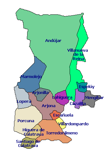 Mapa tradicional de los municipios de la Campiña de Jaén Mapa de la comarca de la Campiña de Jaén, y de sus distintos municipios. Realizado por Johnbojaen.